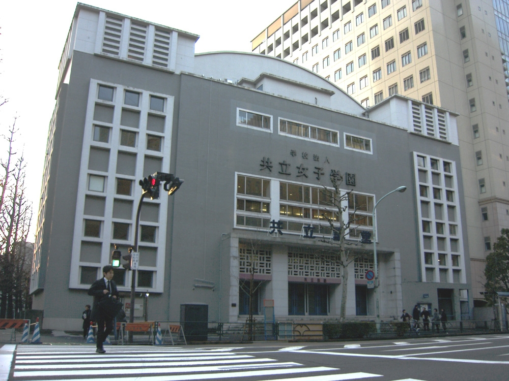 2007年2月18日、学校法人共立女子学園_講堂を投稿者本人が撮影。